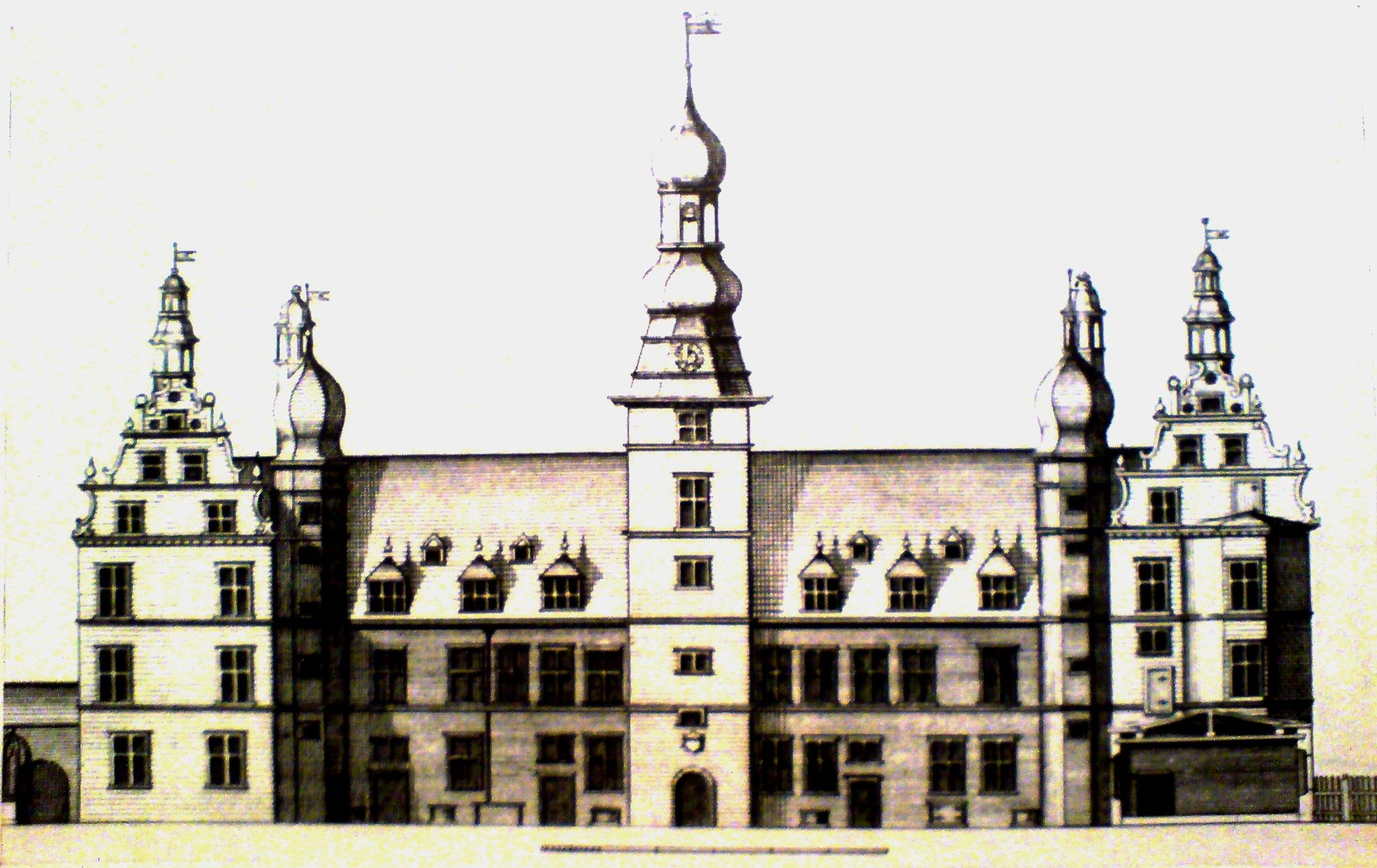 Copperplate of "Den danske Vitruvius", 1748, Laurids de Thura